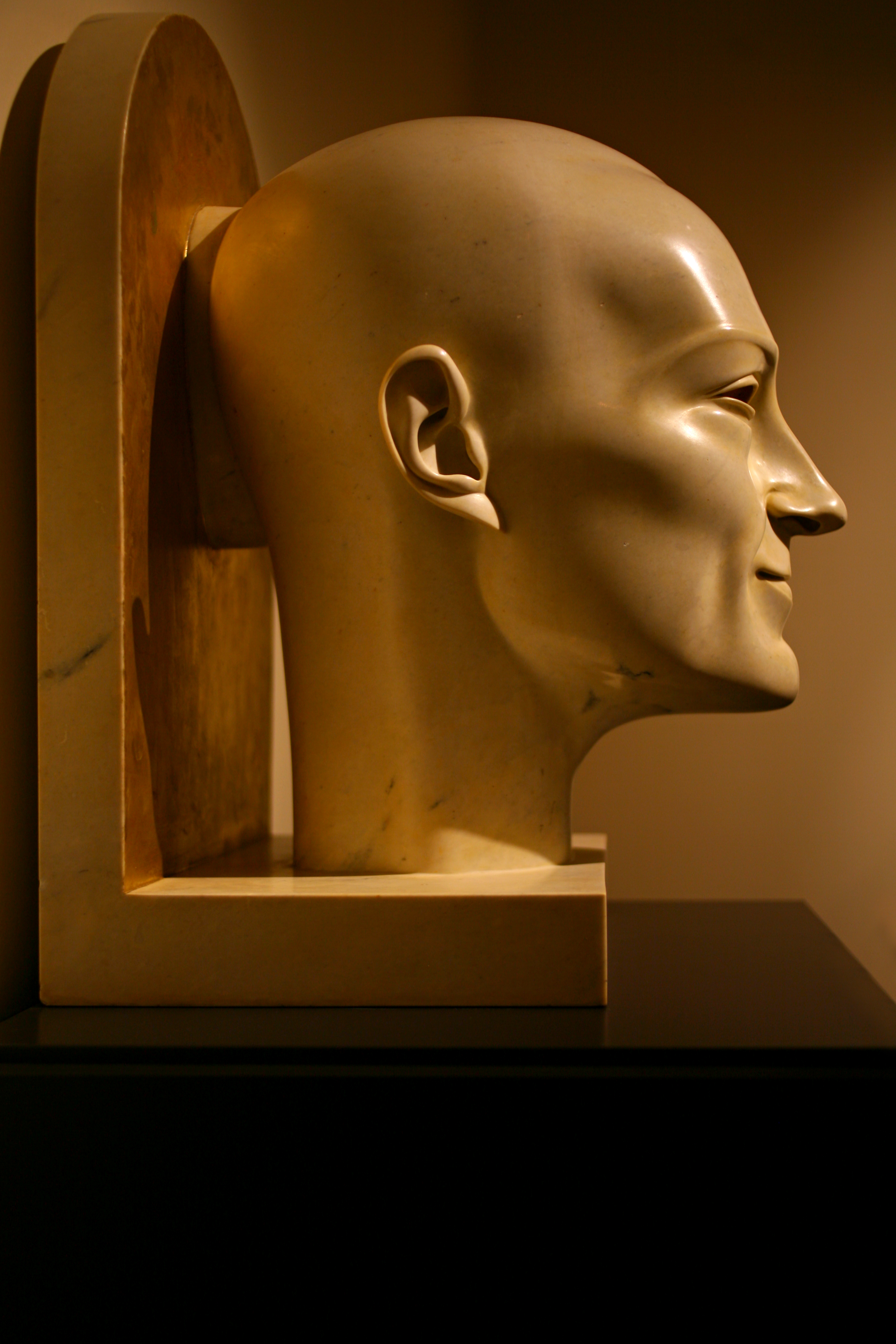 Adolfo Wildt (1868-1931) Fulcieri Paulucci de Calboli (1924)